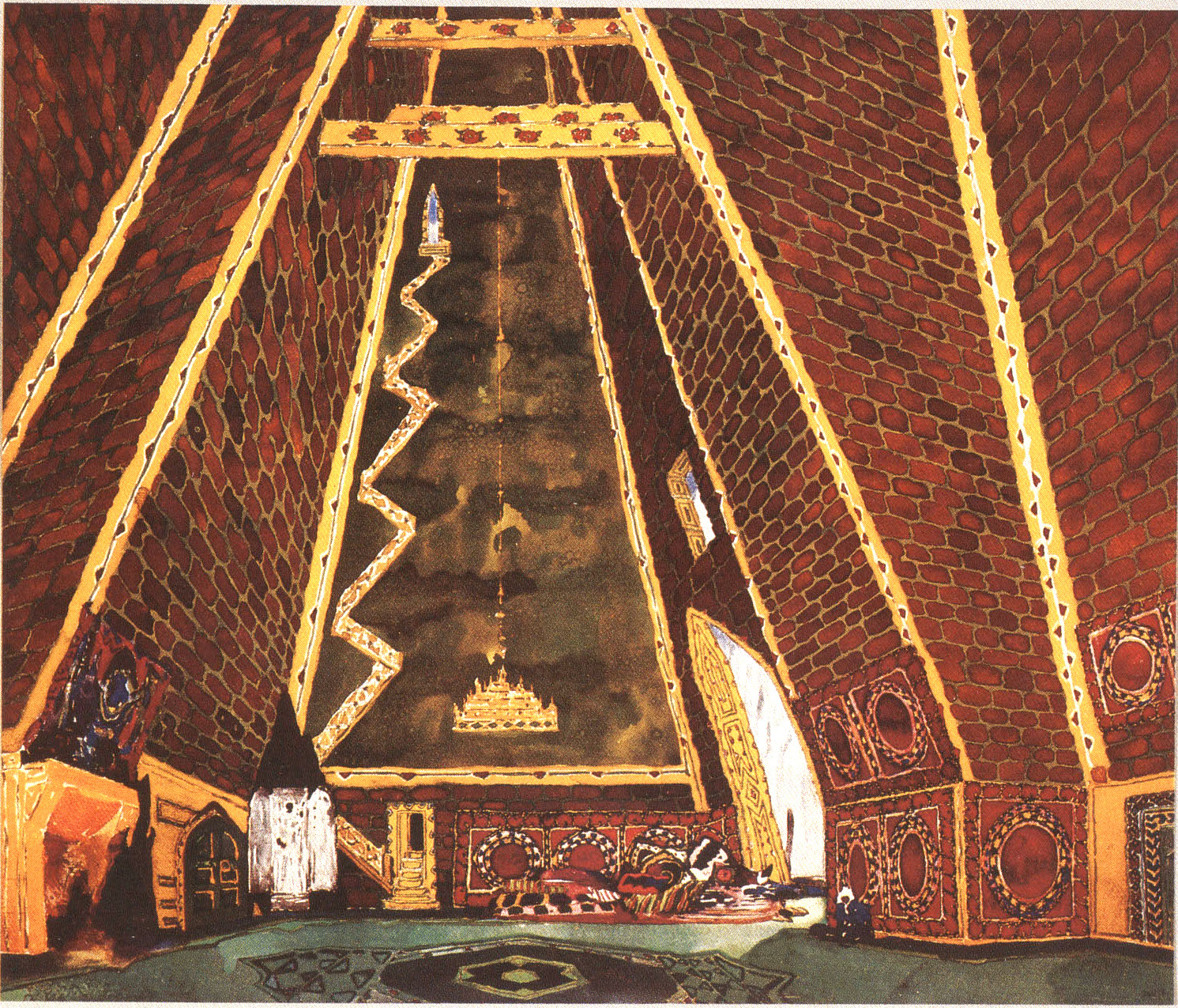 Set design for Thamar Musée des Arts Décoratifs